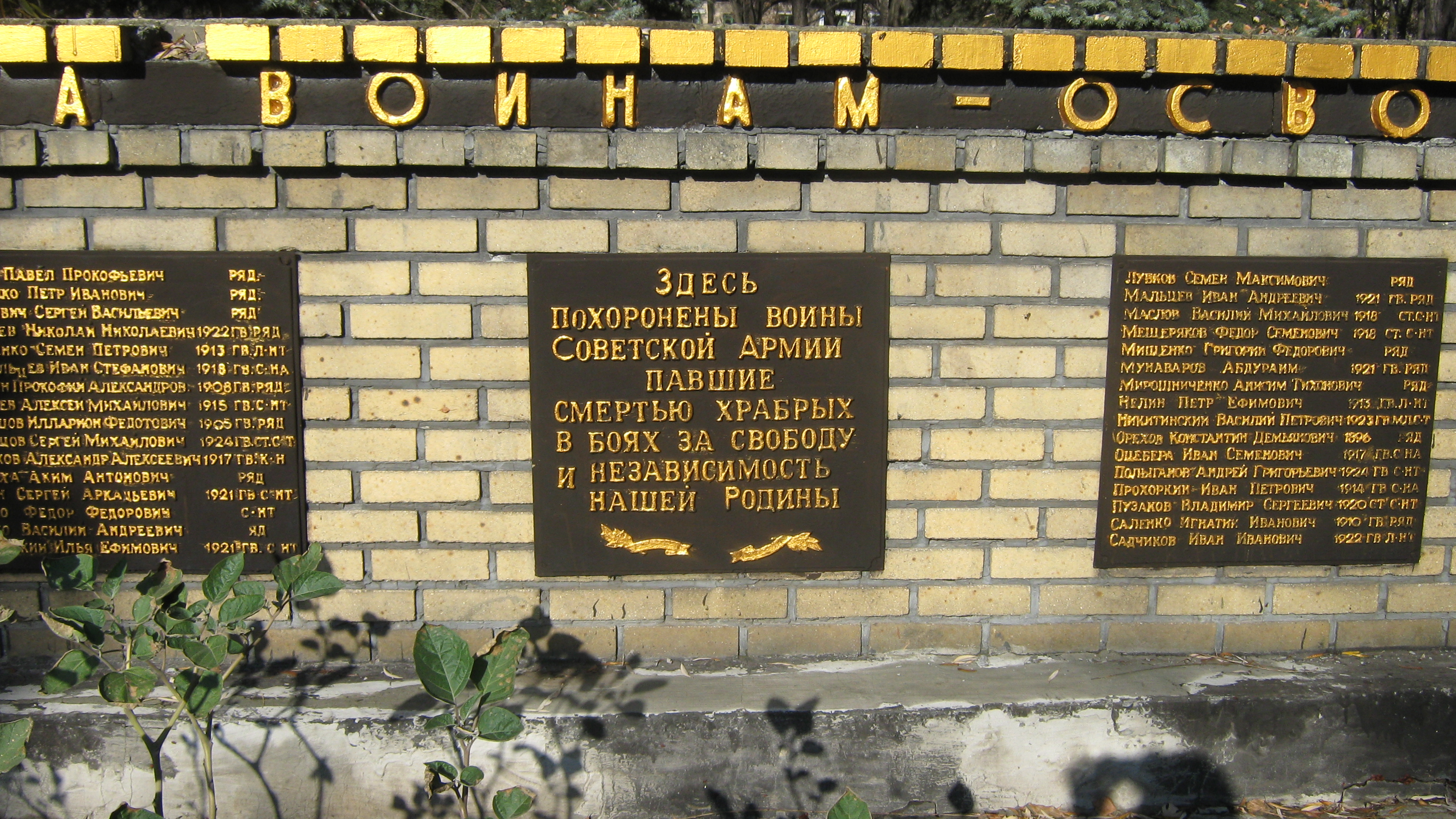 Меморіальні дошки (частина меморіалу)